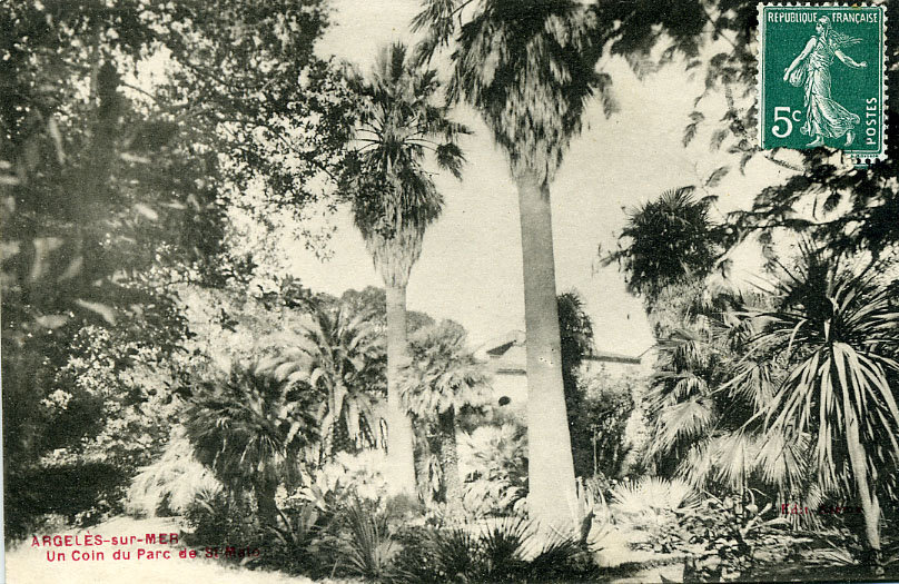 La villa Saint Malo du baron de Vilmarest à Argelès